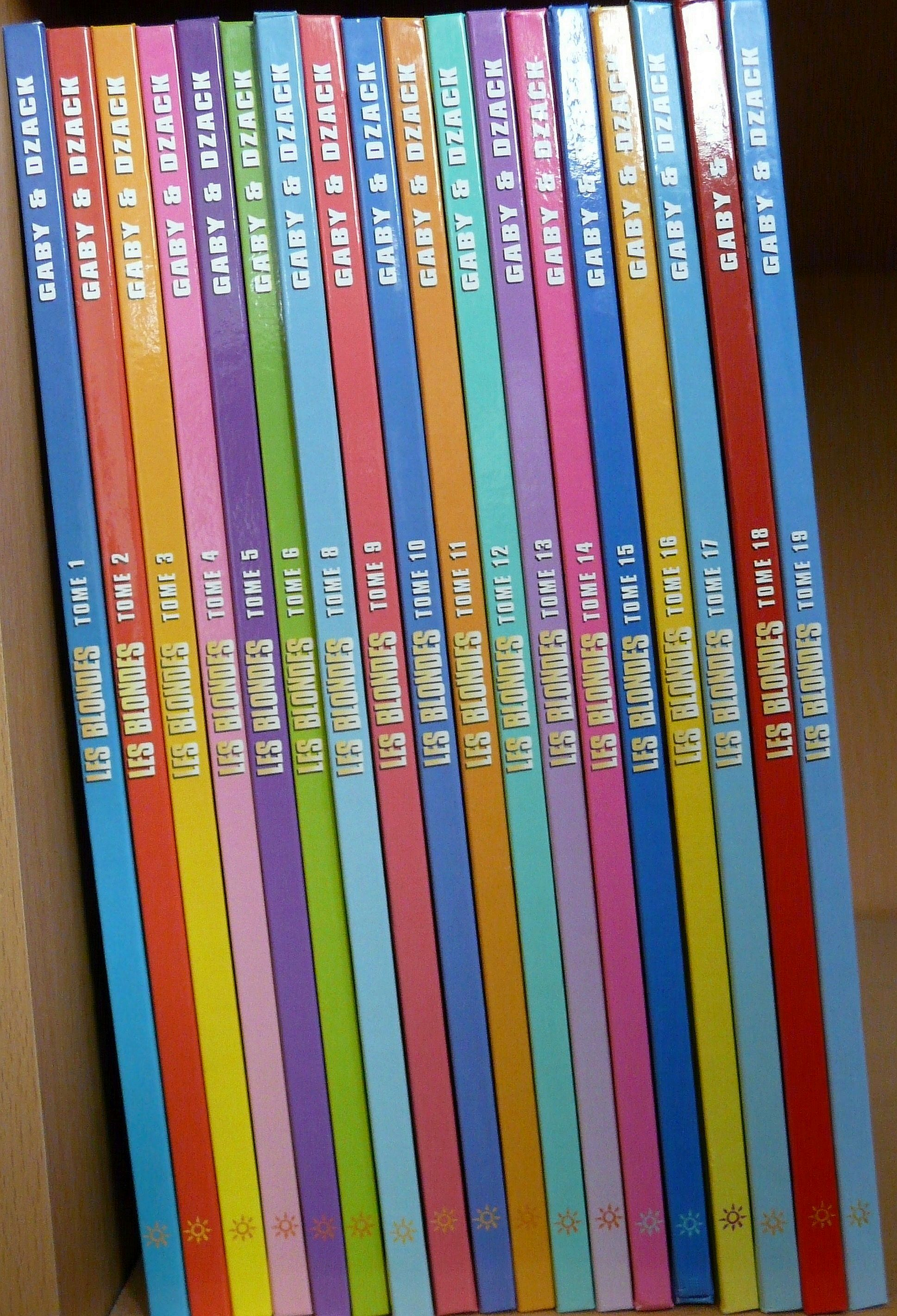 Collection de bande dessinée Les Blondes, numéros 1 à 19 (sauf numéro 7).